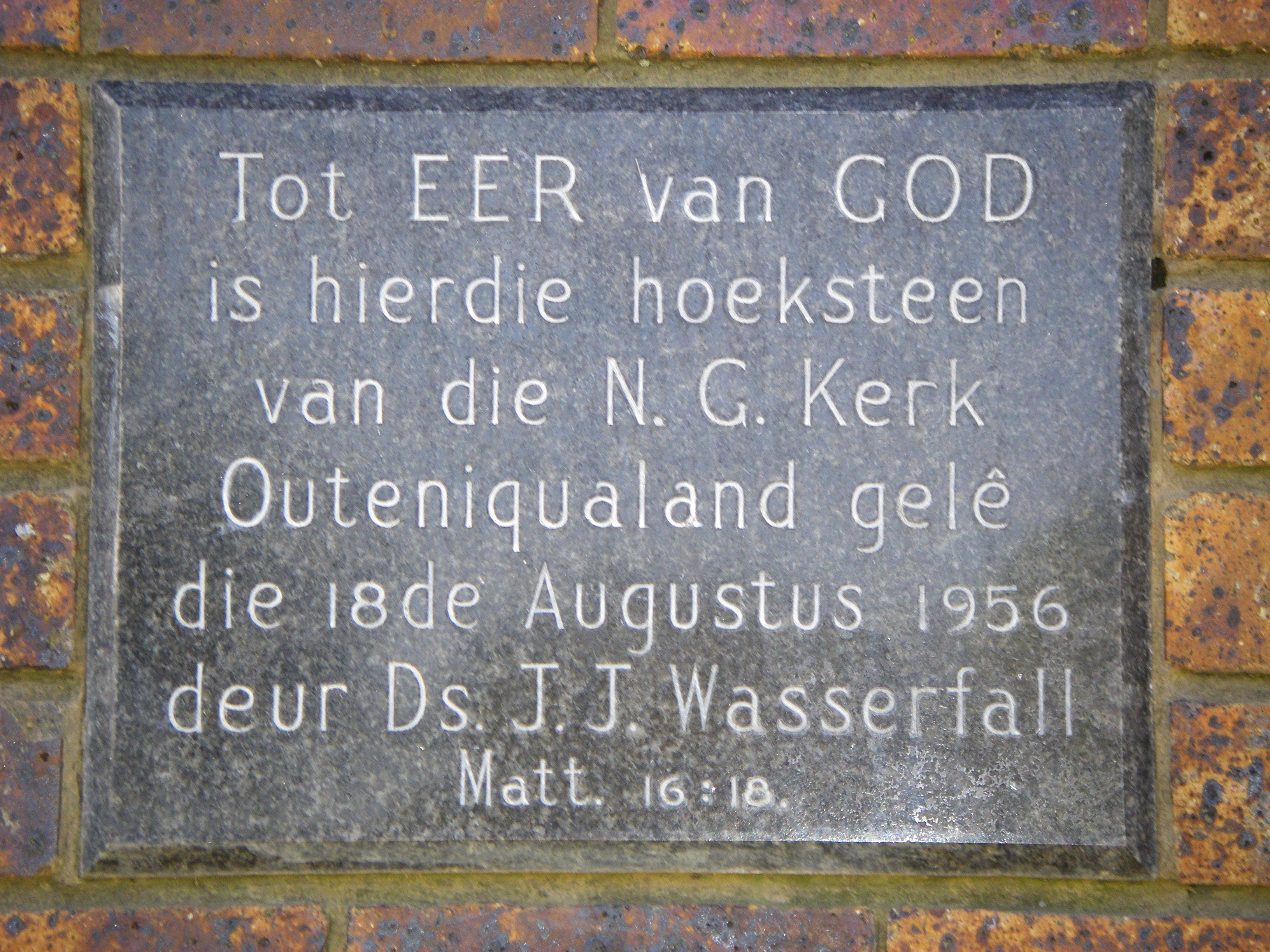 Hoeksteen van die Outeniqualand NG kerk in die distrik van George.